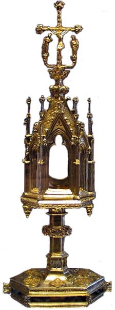 monstrans besteld in 1286 in Parijs door priorin Heilewigis van Diest (volgens de inscriptie op de monstrans), tentoongesteld in Het Stadmus te Hasselt, België. Hoogstwaarschijnlijk is zij dezelfde persoon als Aleidis van Diest (1281-1302) die uit archivarische bronnen bekend is. eigen werk Date: 13 maart 2008 Author:Paul Hermans Permission: (Reusing this image) Bewerkt door Willy Leenders